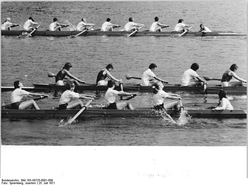 Berlin, Ruderregatta, Achter ADN-ZB Spremberg 25.7.71 Berlin: DDR-Rudermeisterschaften für Schüler, Jugend und Junioren (3. Tag)- Im Achter für Juniorinnen erkämpfte sich die BSG Fortschritt Pirna (im Vordergrund) den Meistertitel.